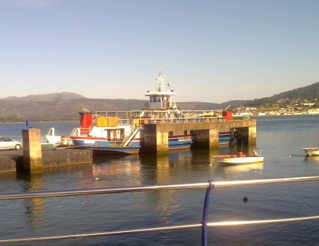 la guardia